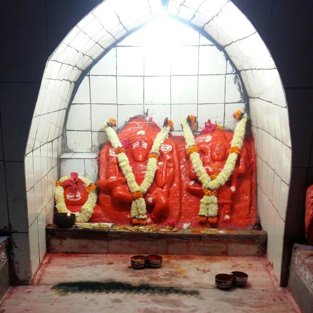 अडबलनाथ